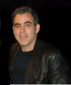 Template:Olance Nogueras Rofes (Nacido en Cienfuegos, Cuba, el 26 de abril de 1969) es un periodista.